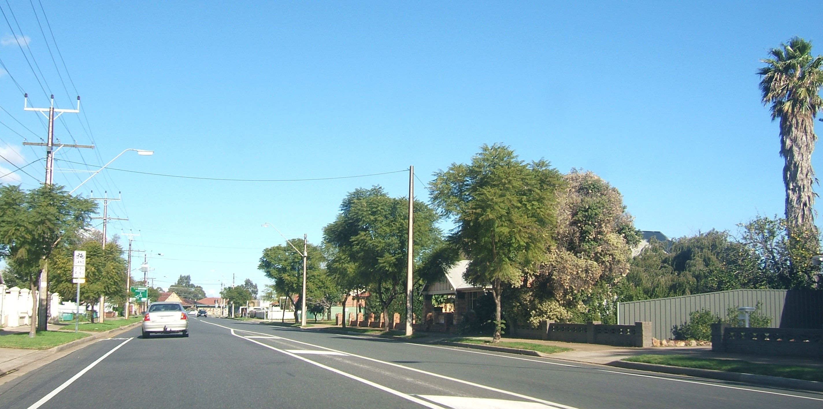 East Av, Adelaide